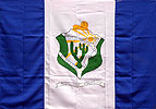 Bandeira do município de Petrolândia